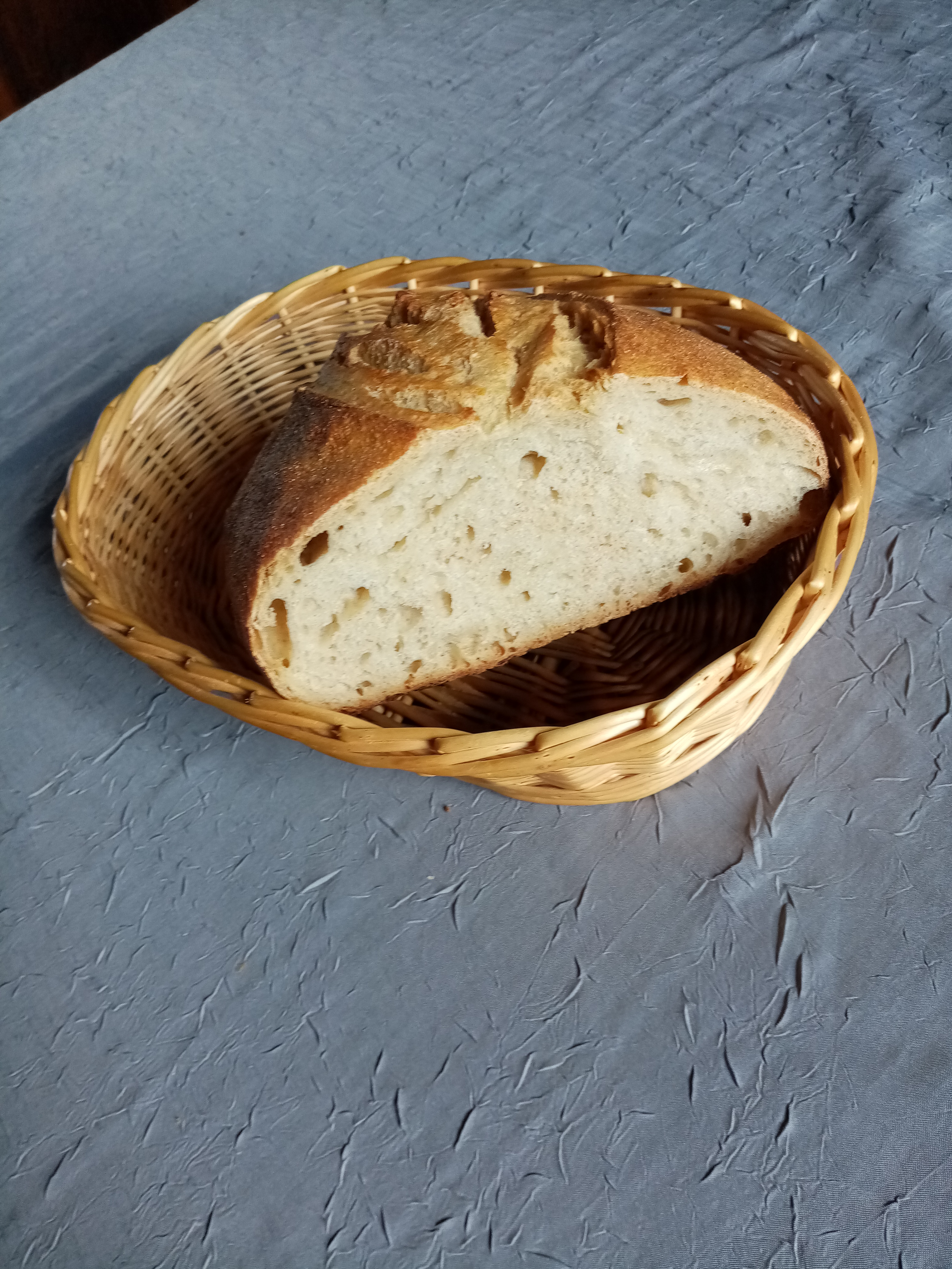 Pain biologique de froment réalisé au levain et au feu de bois par un paysan-boulanger, présenté dans une vannerie de Villaine-les-Rochers. Indre-et-Loire, 2020.